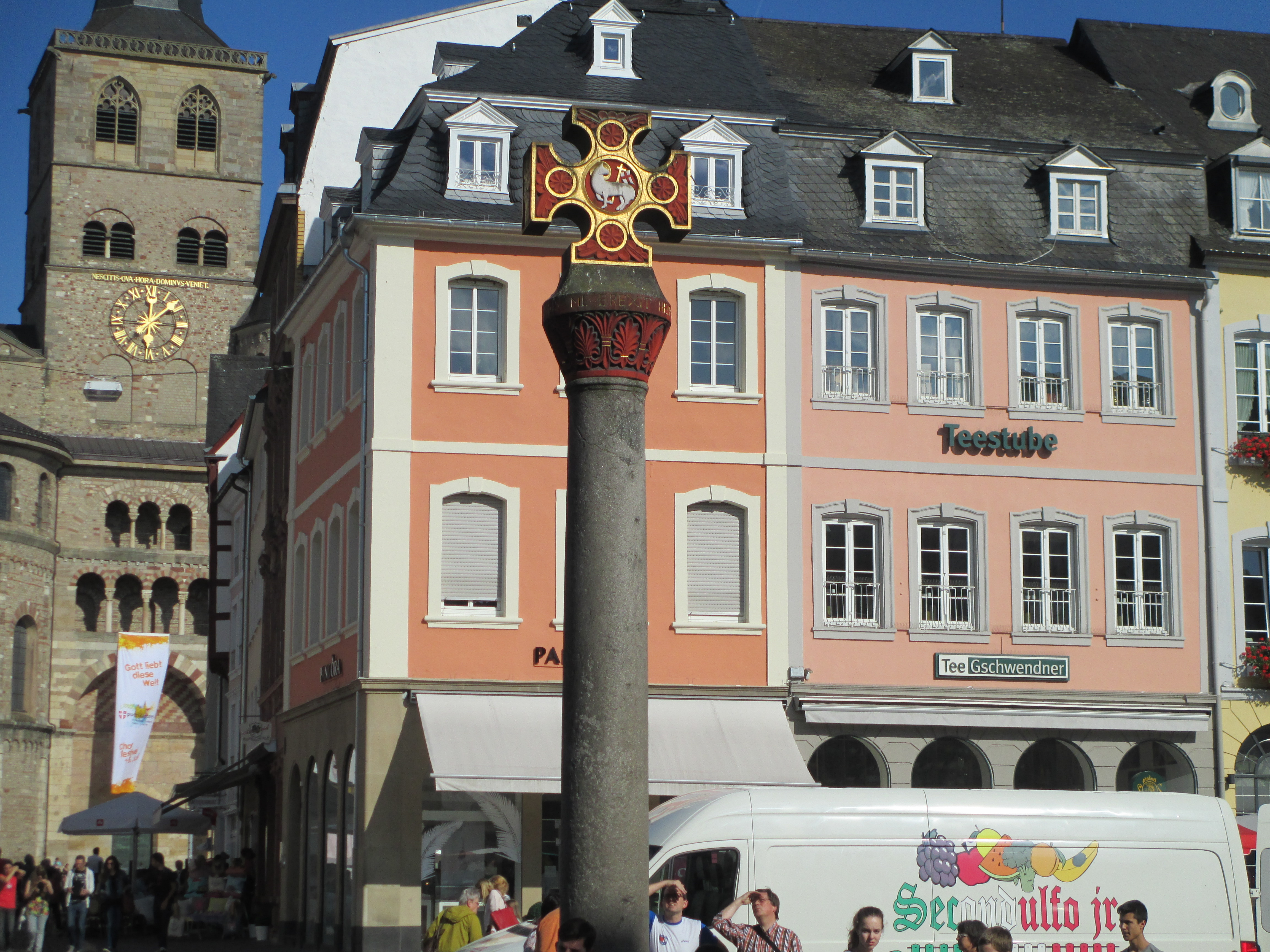 עמוד הצלב בכיכר השוק בטריר